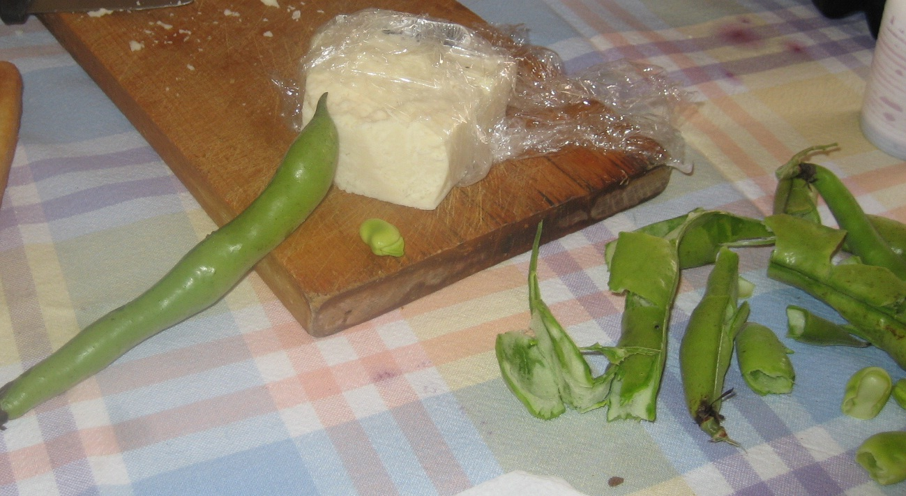 Fava-italia-italy